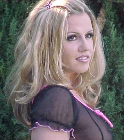 Inari Vachs On the set (1999) crop